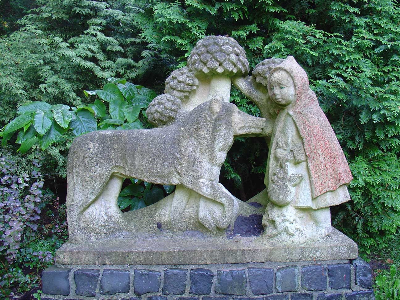 Roodkapje en de wolf in het Julianapark te Stadskanaal door Kees de Kruijff (1959)